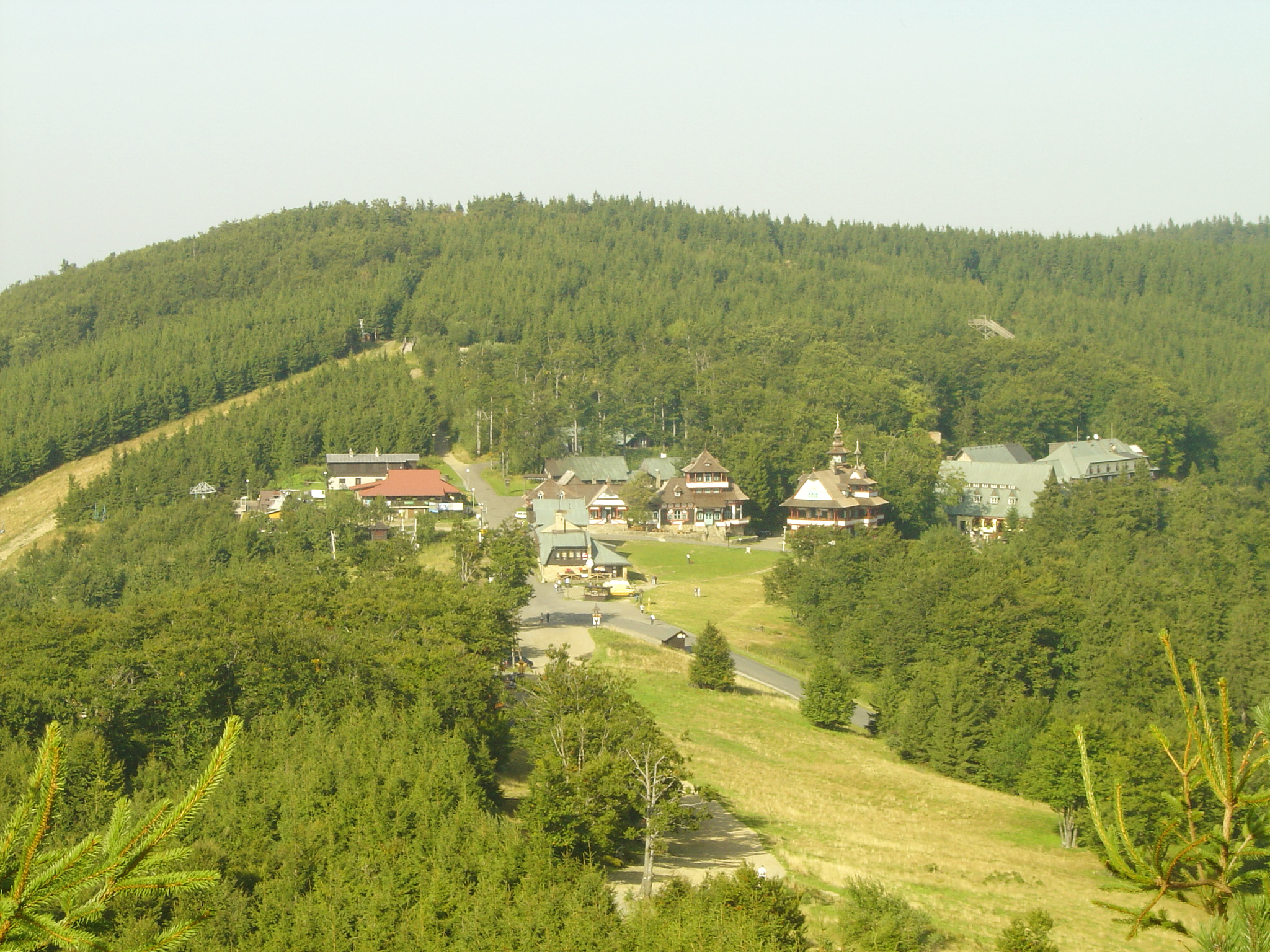 Pustevny na hoře Radhošť